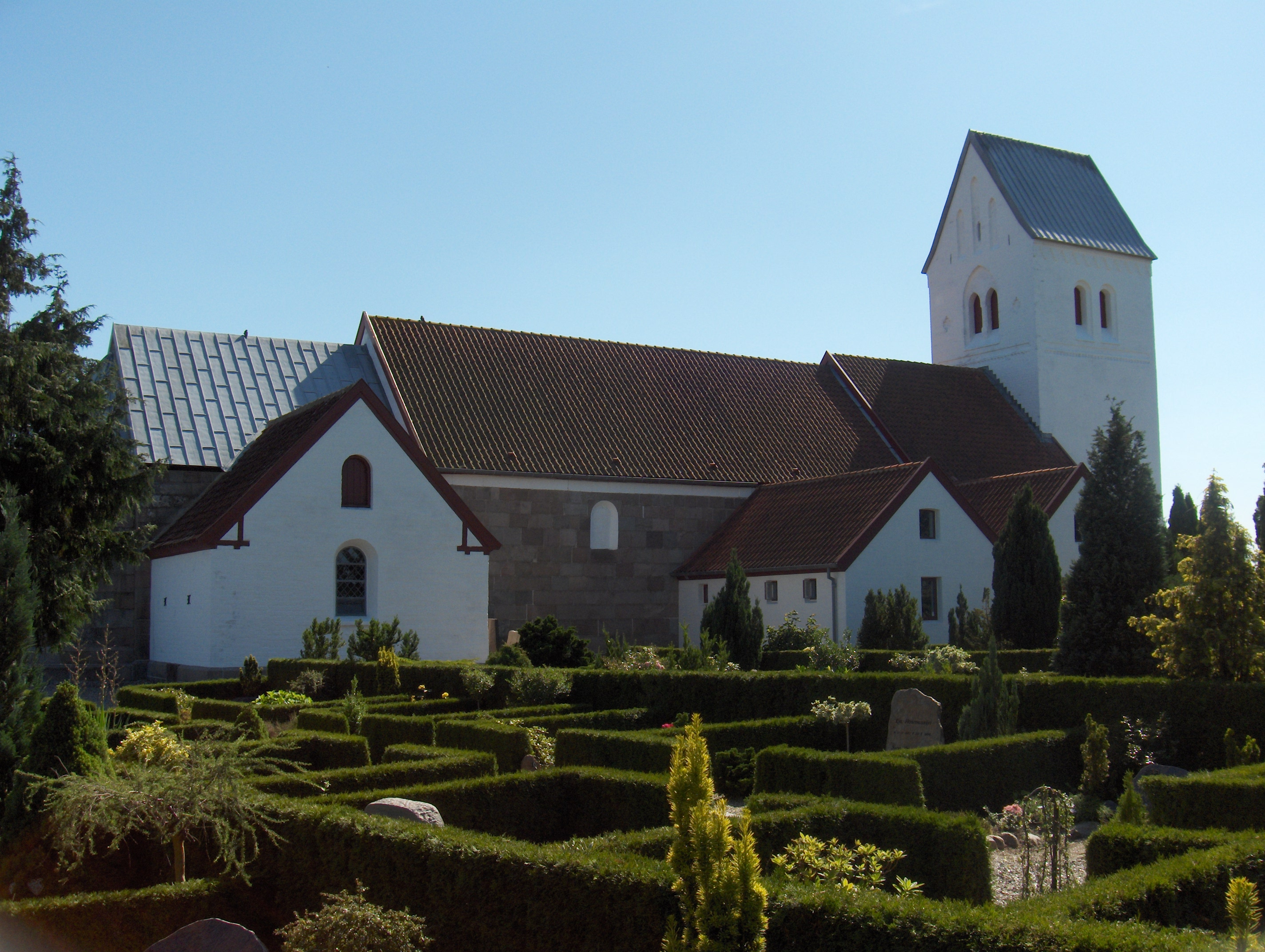 Nørre Tranders Kirke i Aalborg